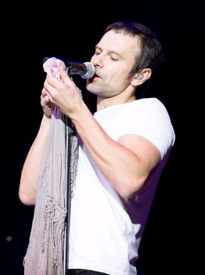 Океан Ельзи в Казані